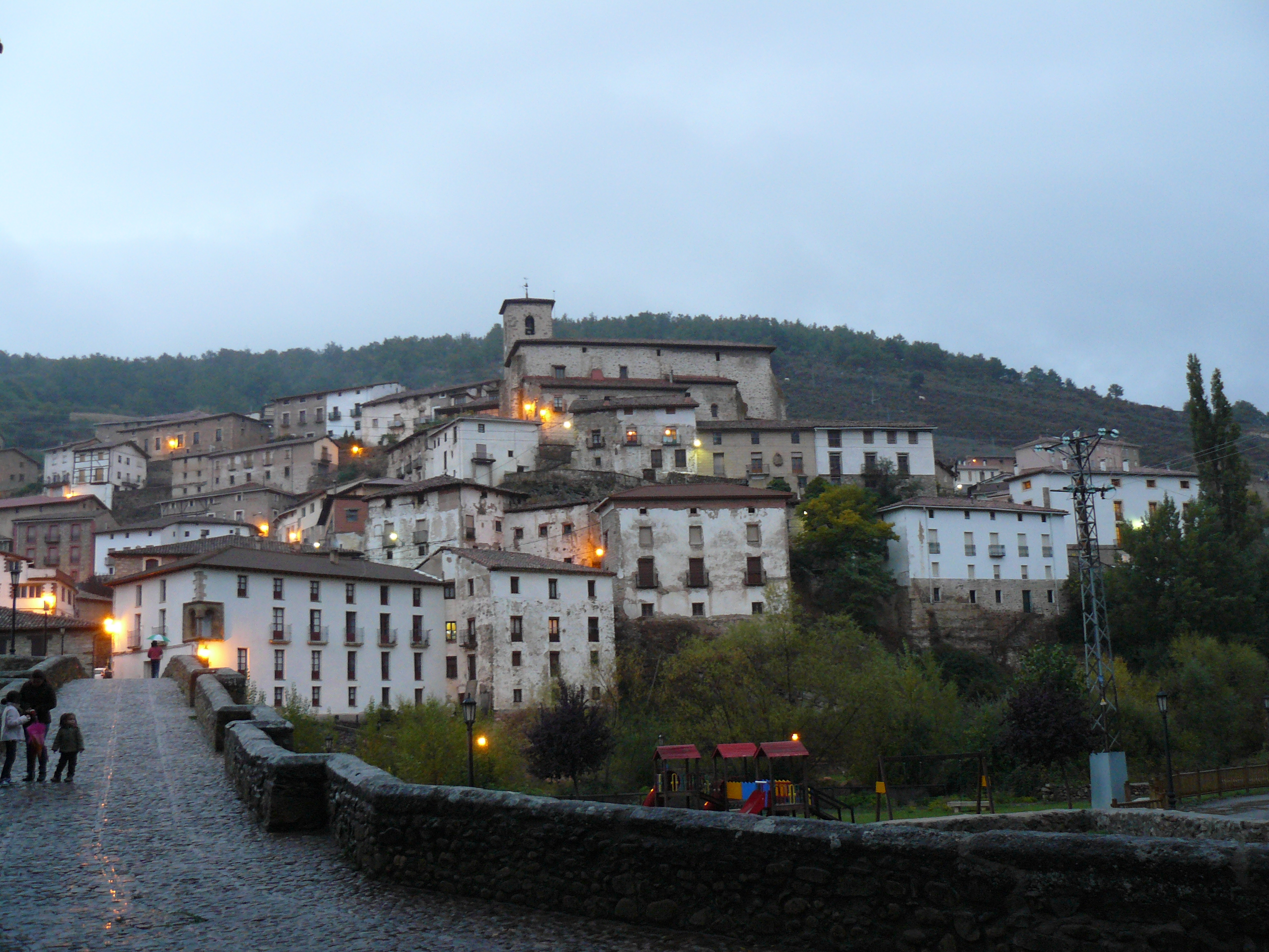 Vista parcial de Villoslada de Cameros.